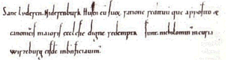 Vergrößerter und montierter Ausschnitt der Zeilen 14 und 15 der ältesten Leider (Zeile 14: Lyderen) erwähnenden Urkunde. Bayerisches Staatsarchiv Bamberg, Bamberger Urkunden Nr. 256 (Aufnahme Hauptstaatsarchiv München).